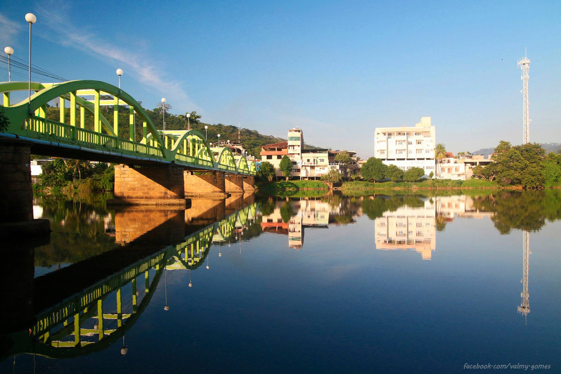 Foto da Ponte Raul Veiga na cidade de Santo Antônio de Pádua, Rio de Janeiro, Brasil, refletida nas águas do Rio Pomba.